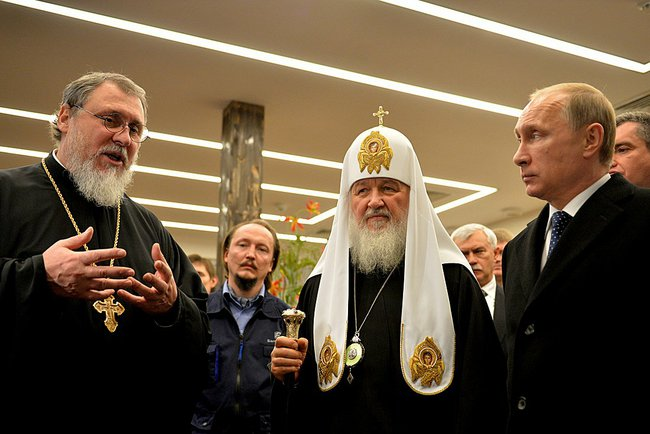 Владимир Путин в храме преподобного Сергия Радонежского в Царском Селе, 8 декабря 2014 года